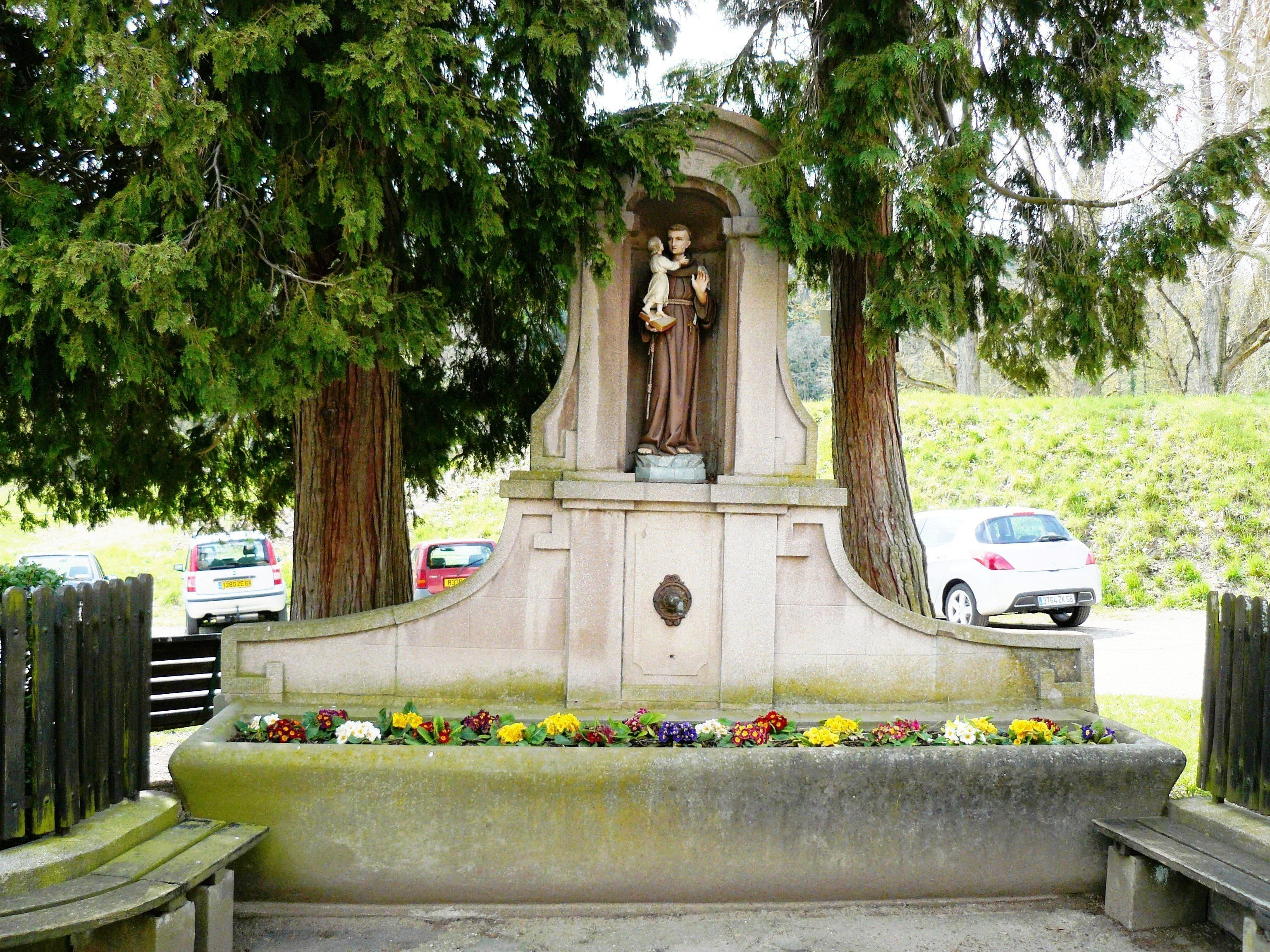 Fontaine Saint-Antoine au Prieuré de Thierenbach (Haut-Rhin).